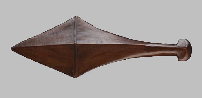 Supi war club